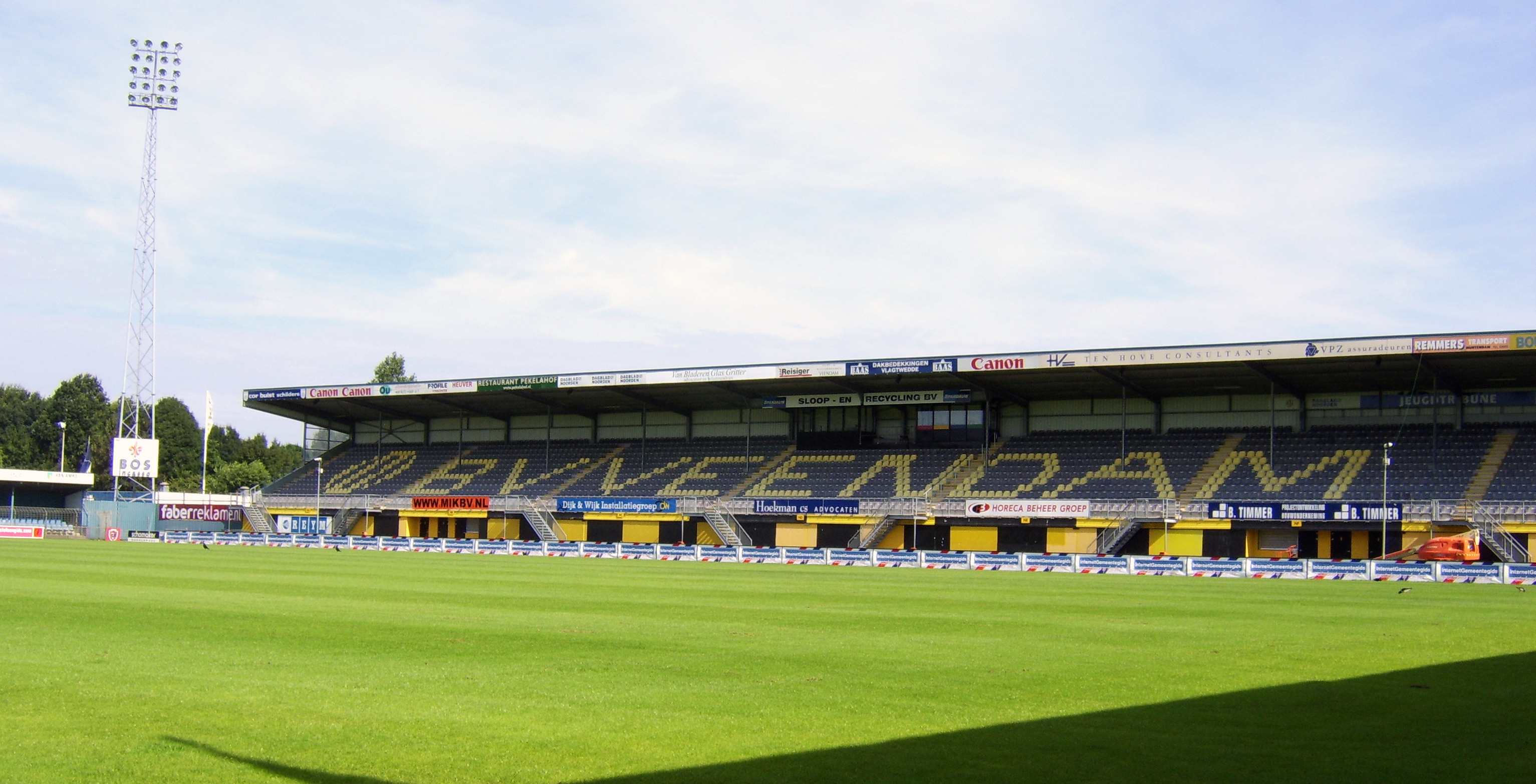 Gjaltema Stadion aan de Langeleegte, Veendam, Netherlands